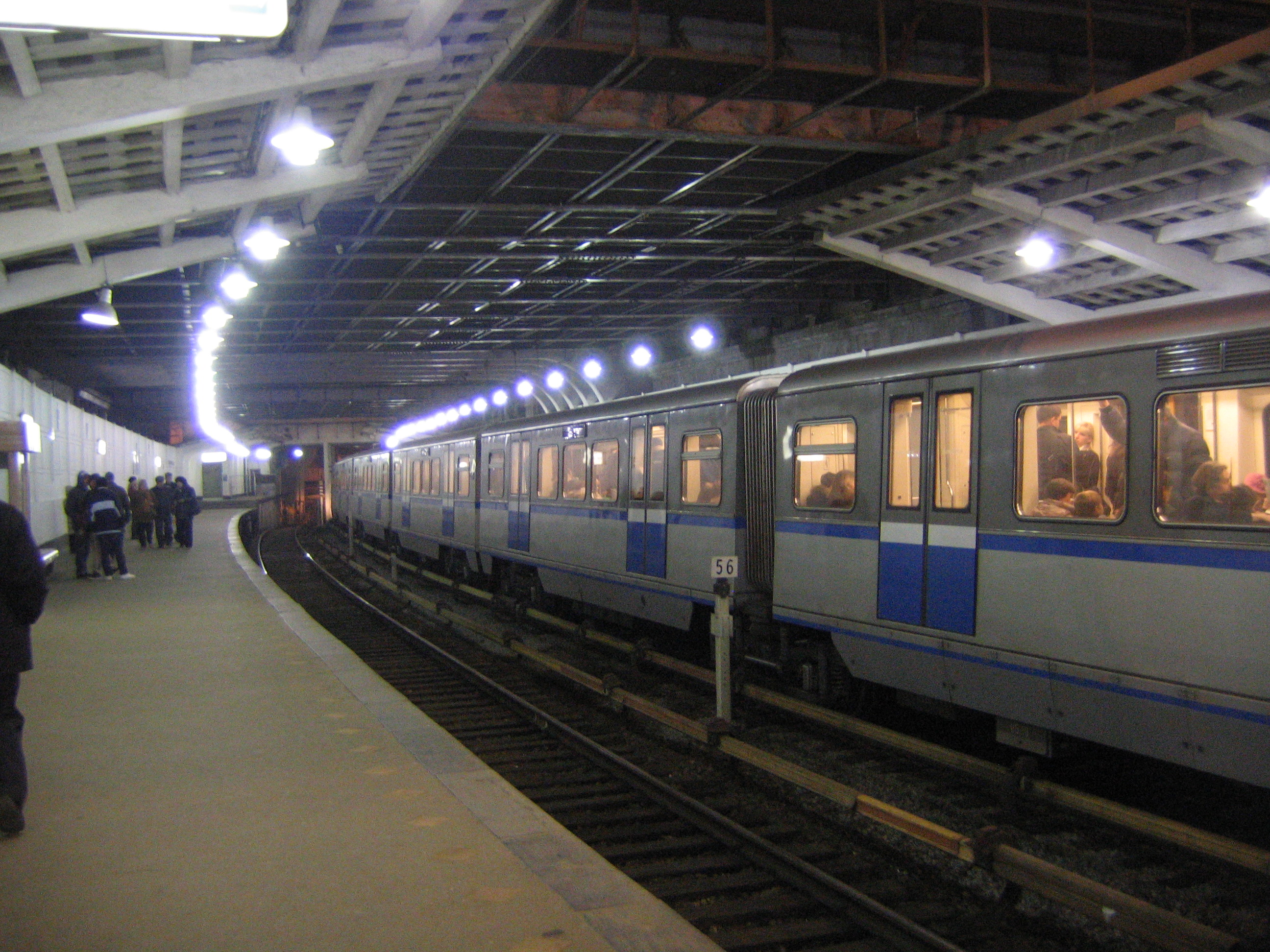 Kutuzovskaya subway station, Moscow, Russia